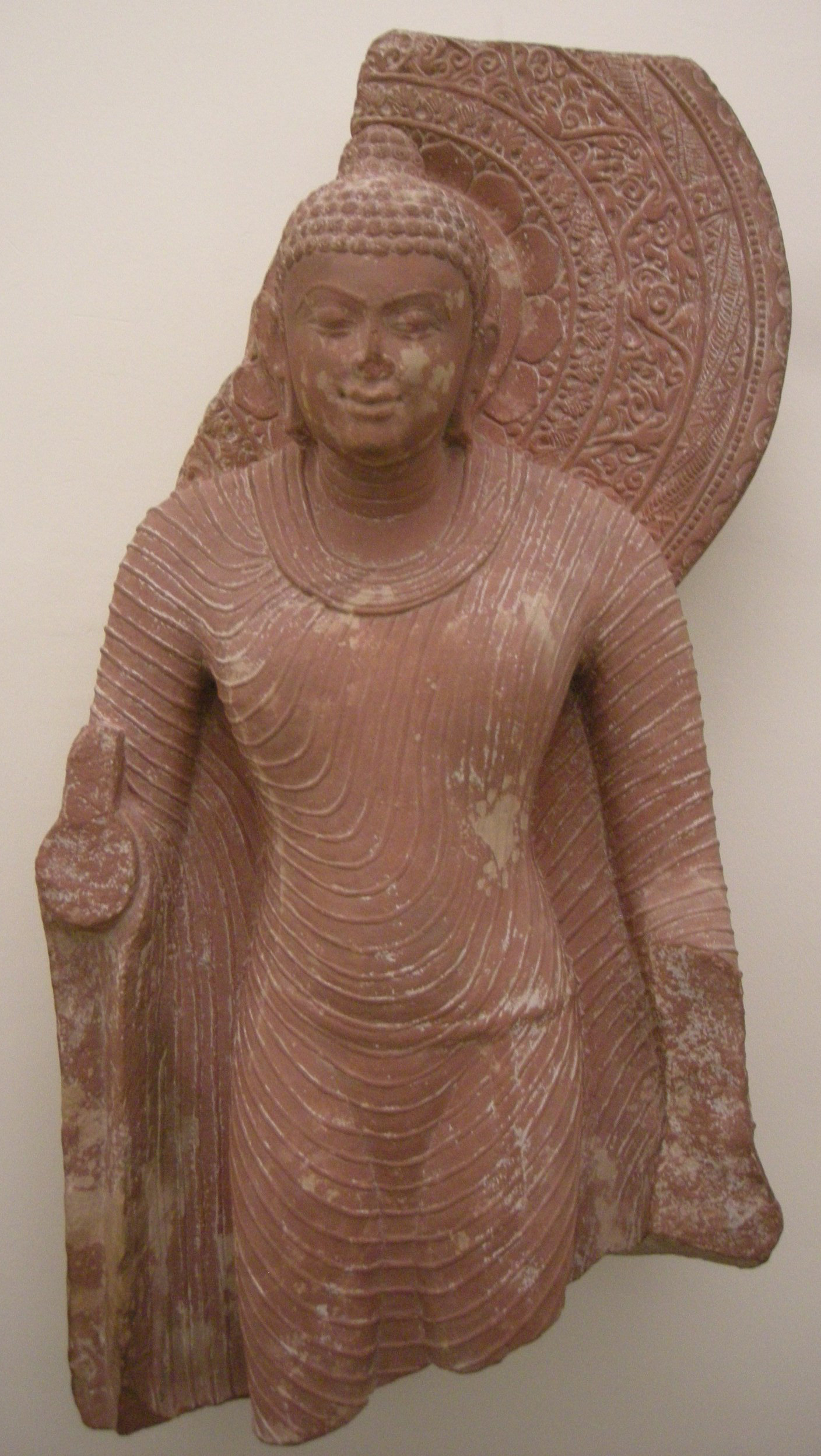 Mathura (uttar pradesh), buddha stante, V-VI sec.